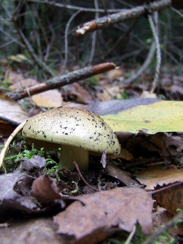 Tricholoma equestre. Karmėlava forest, Lithuania.